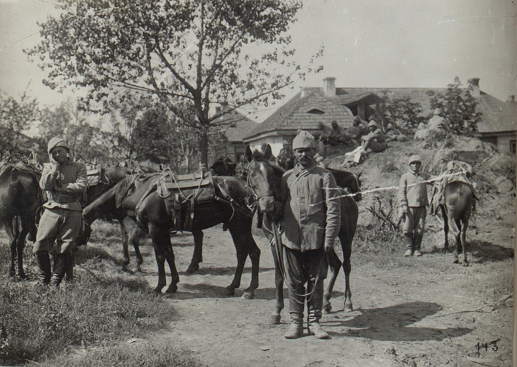 Kowel: Türkische Soldaten.